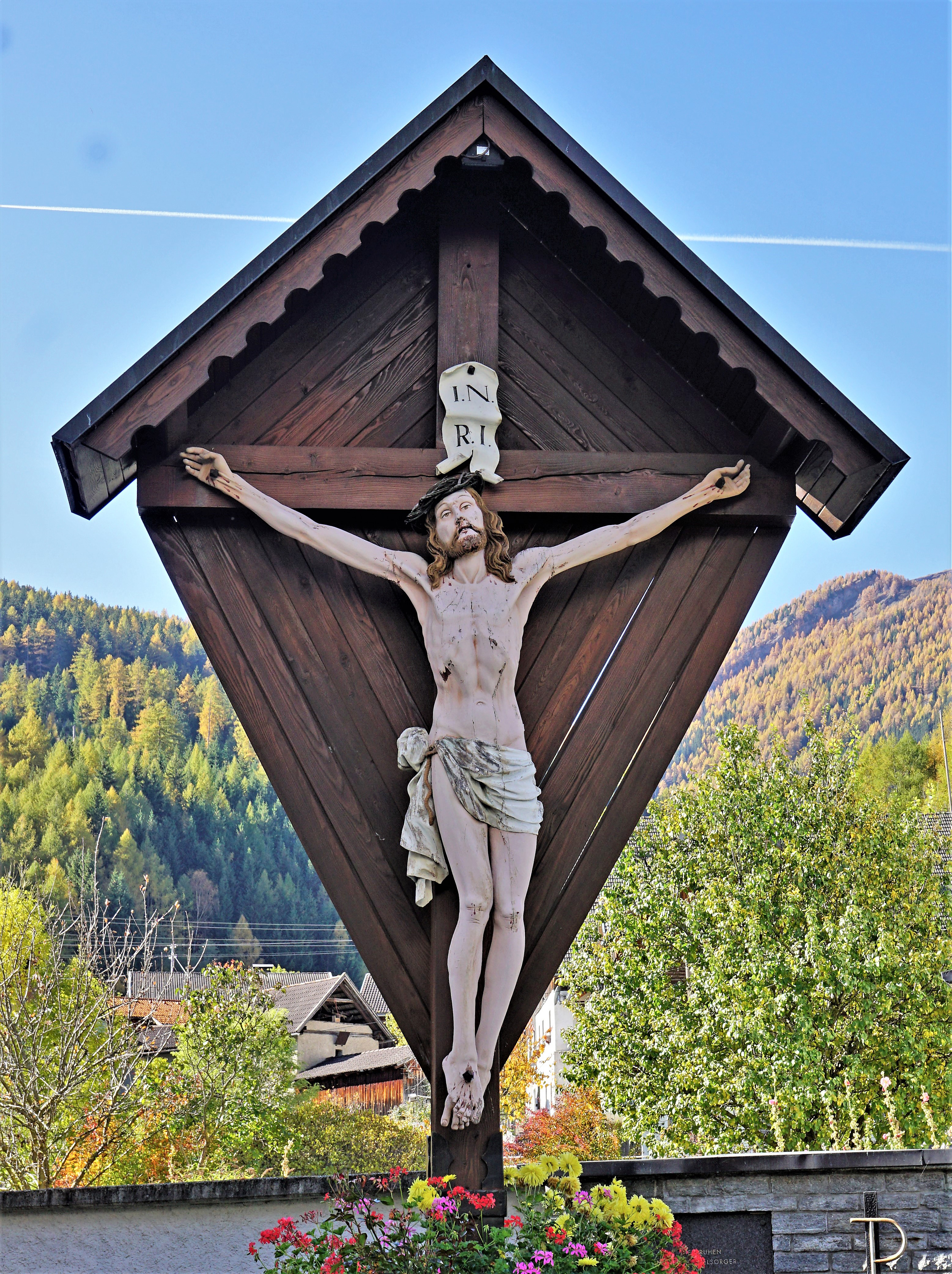 Kath. Pfarrkirche St. Peter im Katschtal, Friedhofskreuz